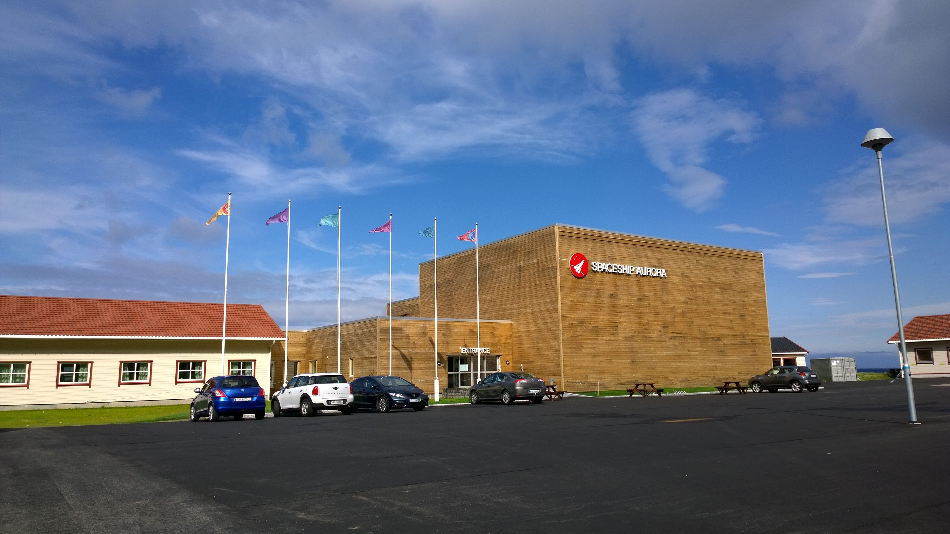 Spaceship Aurora ved Andøya Space Center.